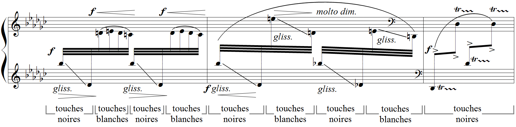 Debussy - Etude "pour les huit doigts", mes.33-35